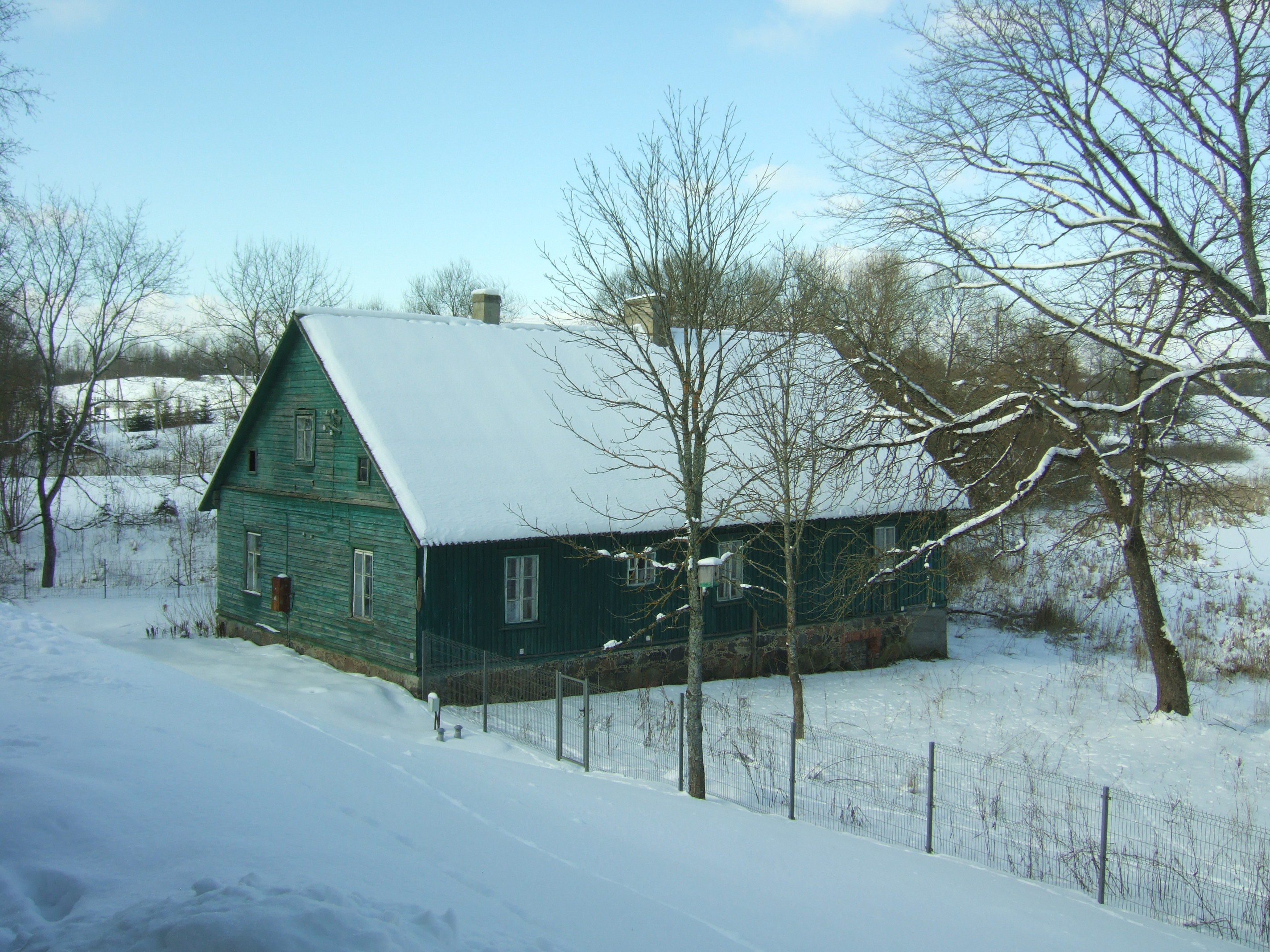 Sudervės dvaro sodybos oficina